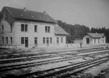 Bahnhof Jägersburg 1903 vor der offiziellen Eröffnung